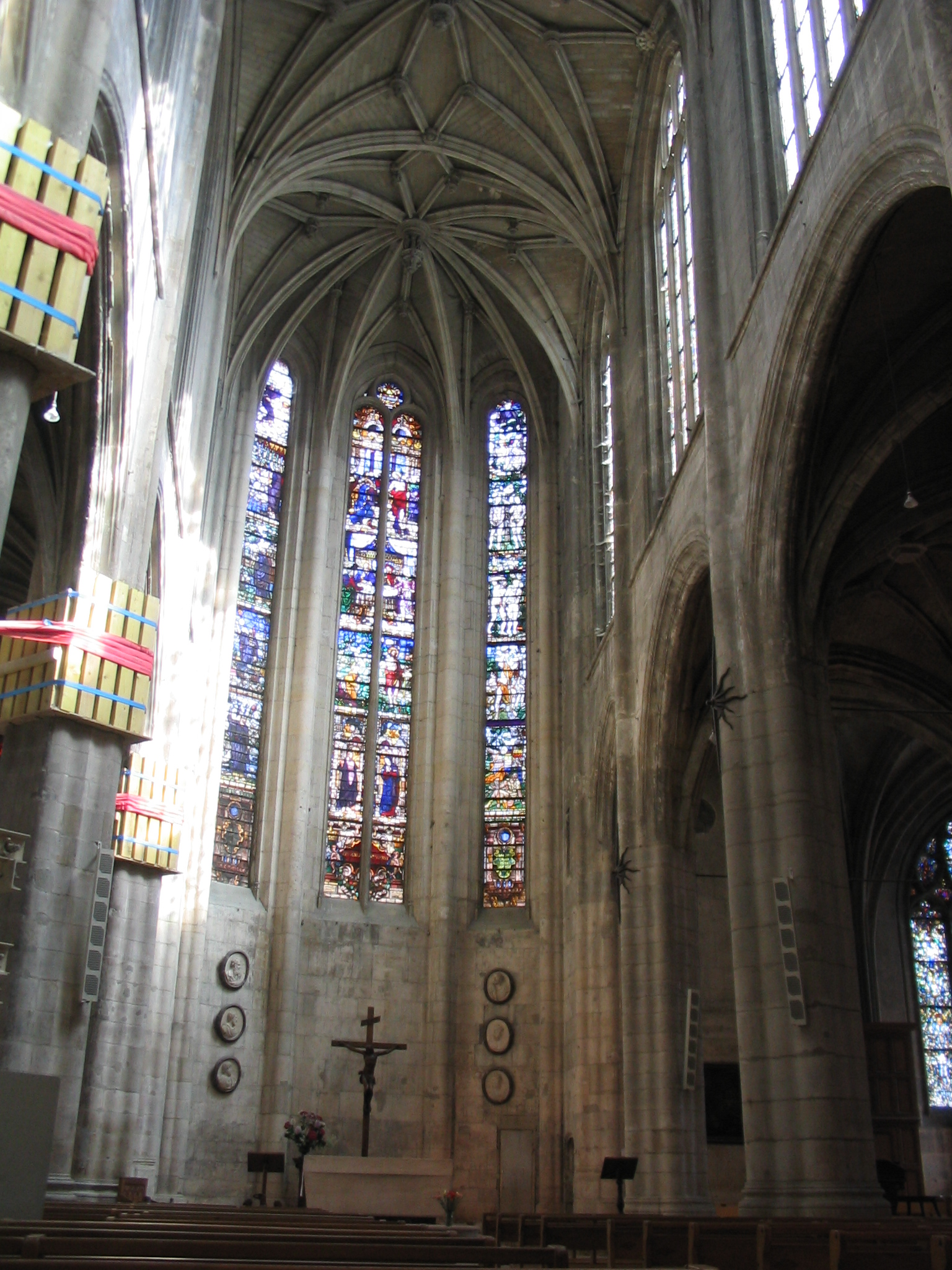 Intérieur de l'église Saint Aspais de Melun. Interior of Saint Aspais Church, in Melun, France(Seine-et-Marne). Author,Auteur:Tej